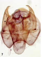 Ectoedemia amani male genitalia